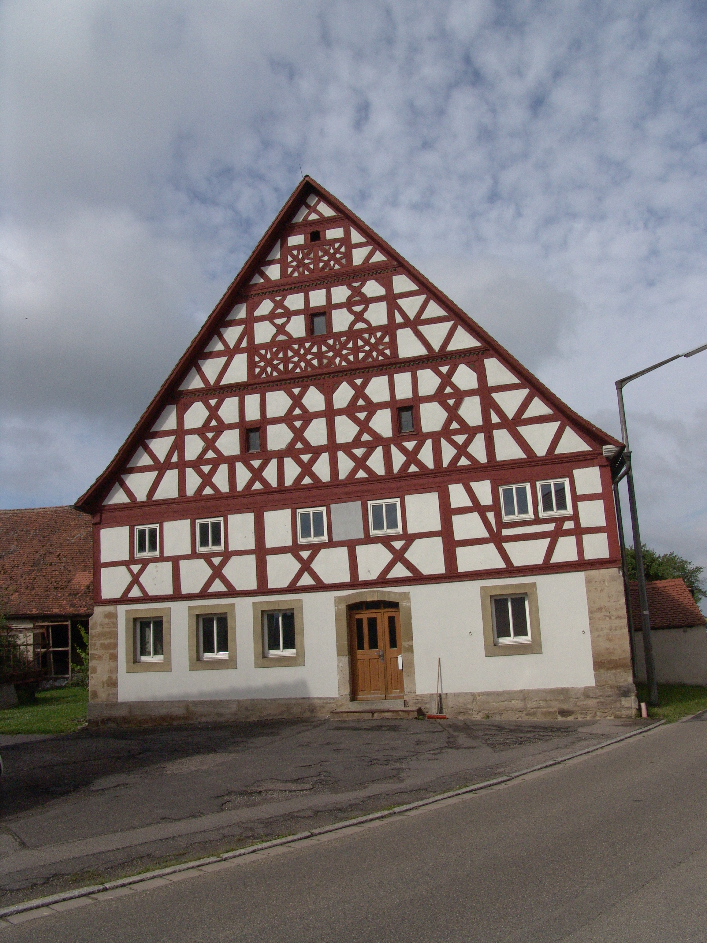 Hagenau, Haus Nr. 12